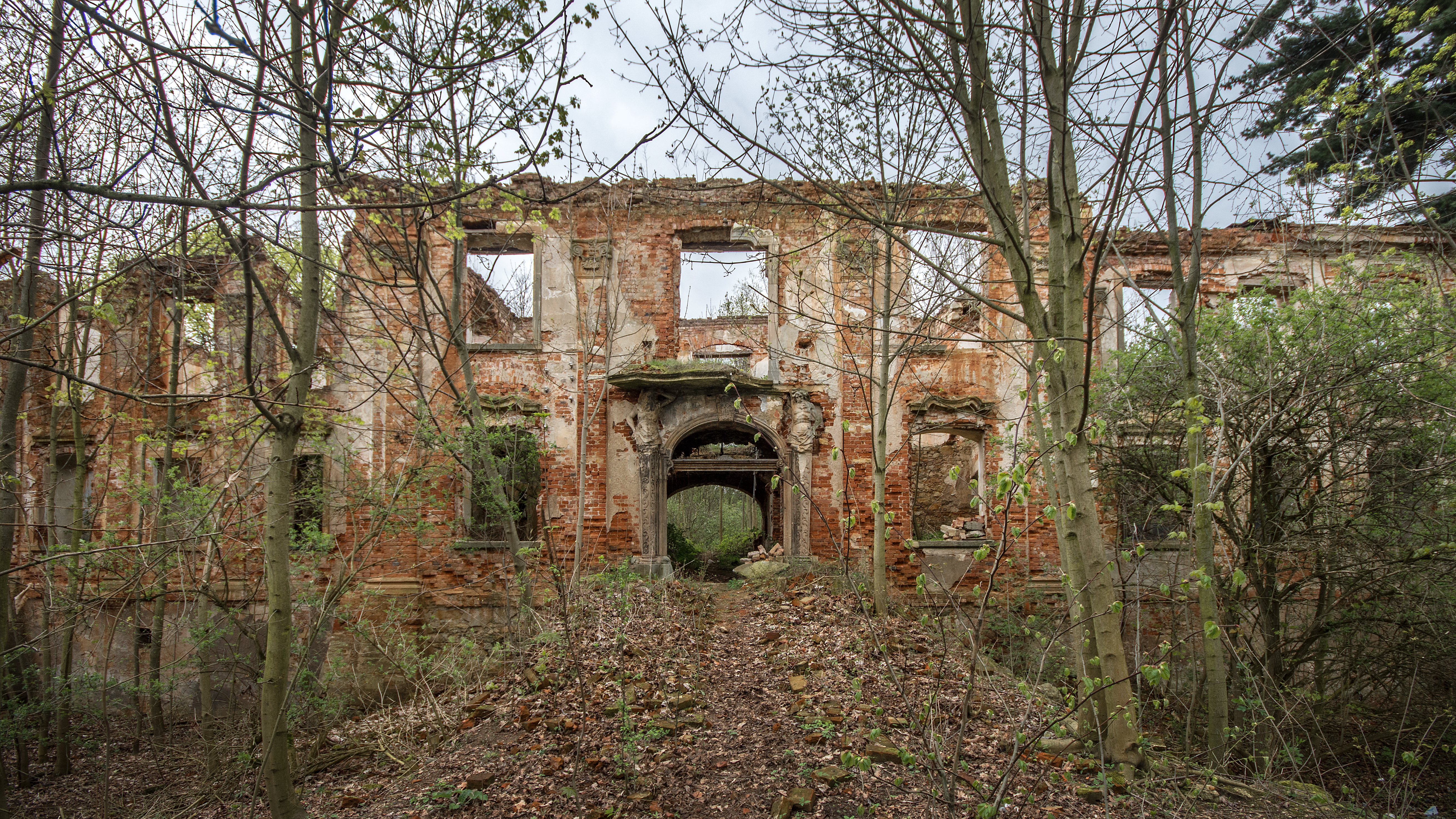 Kamionna, pałac, ok. 1570, 1740, 1 poł. XIX